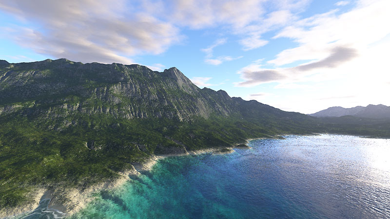 TerraGen-Szene mit "3D-Clouds", Wasser/Transparenz Sonstiges: Wir stimmen den Bedingungen der genannten Lizenz zu.